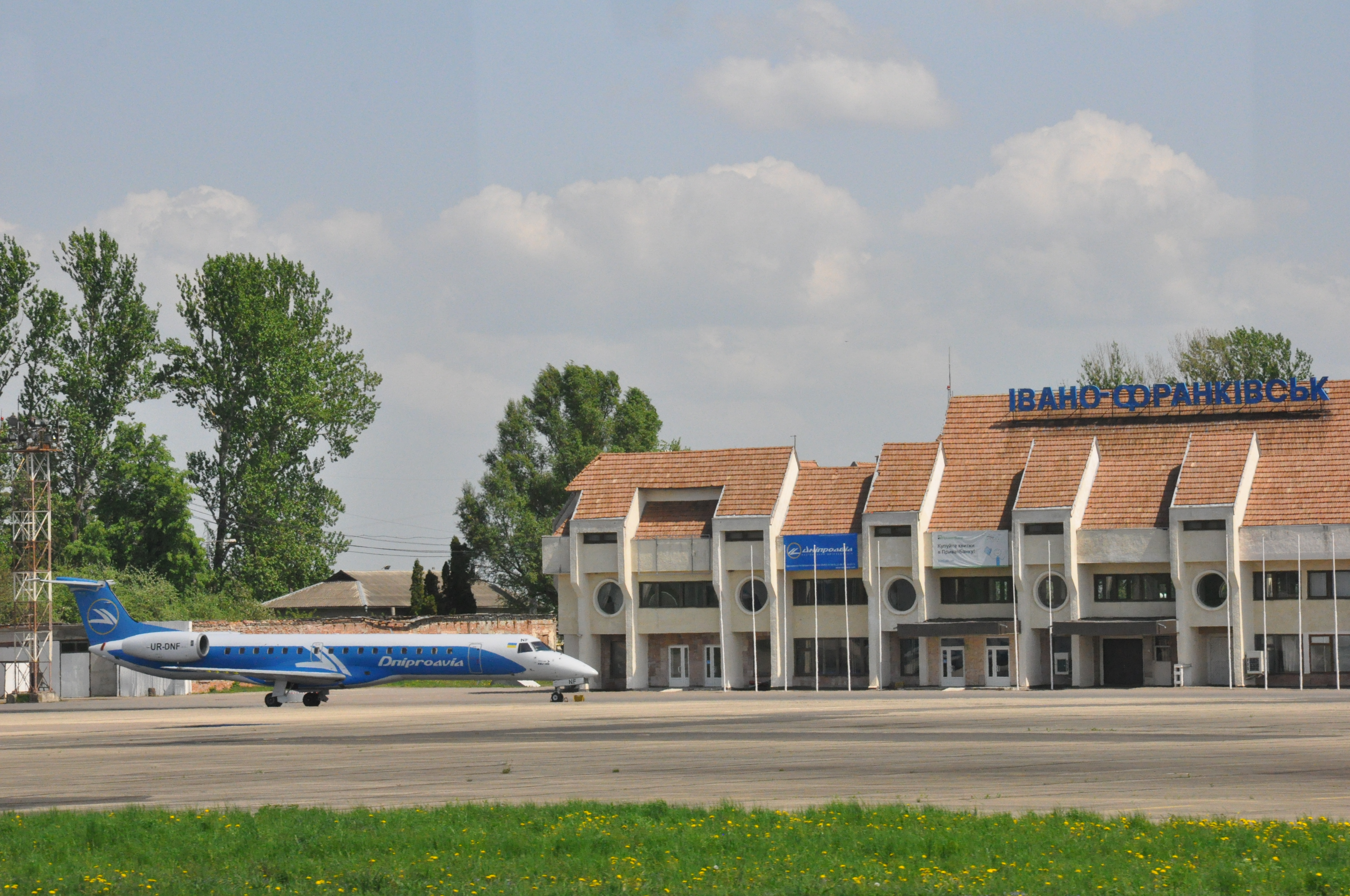 Термінал та борт Дніпроавіа